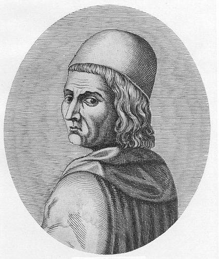 Marsilio Ficino (1433–1499), italienischer Humanist. Stich von de Boulonois